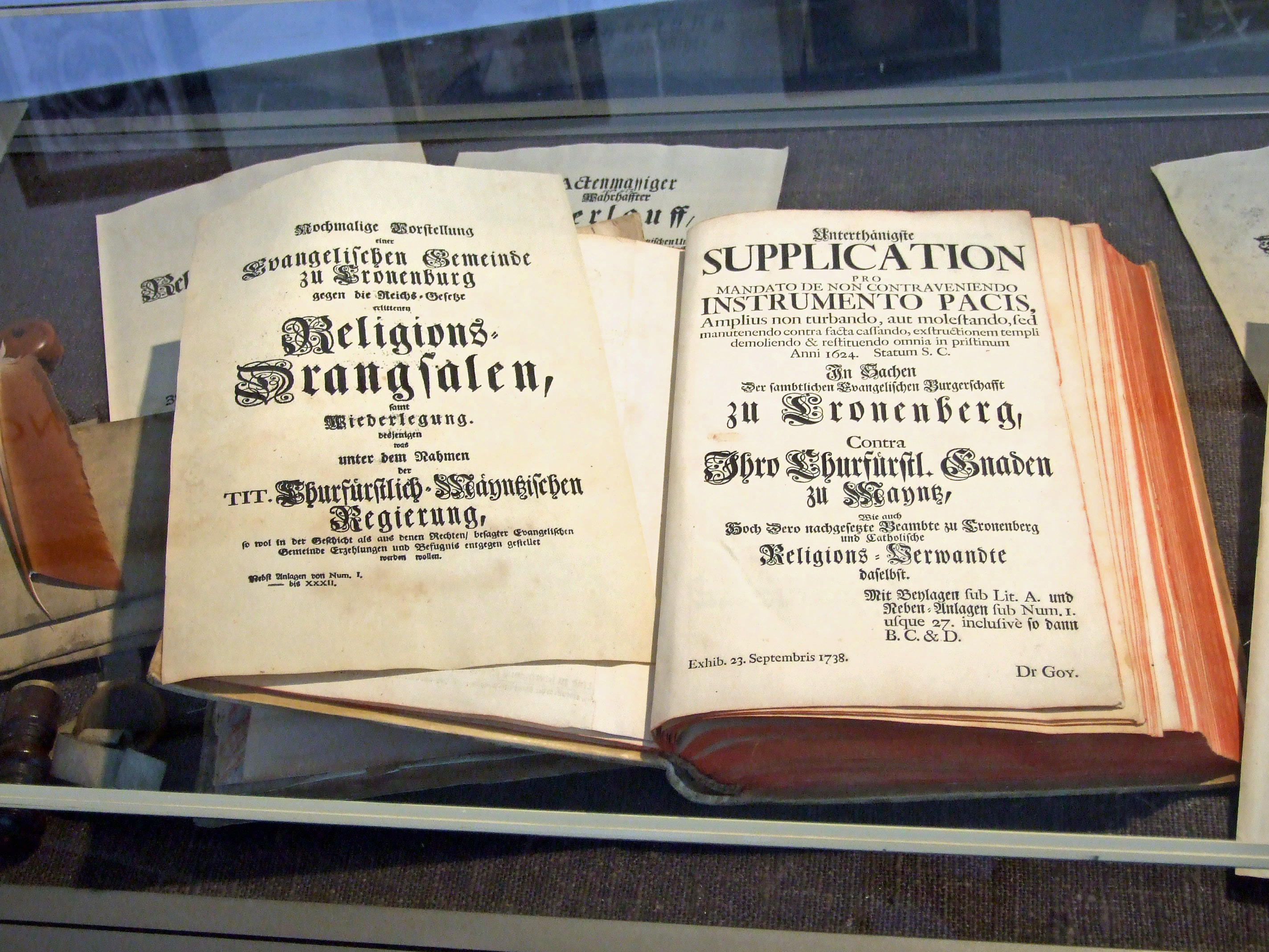 Klageschrift der evangelischen Gemeinde gegen den Kurfürsten und Erzbischof von Mainz, 18. Jh, im Kronberger Burgmuseum, Kronberg Ts.